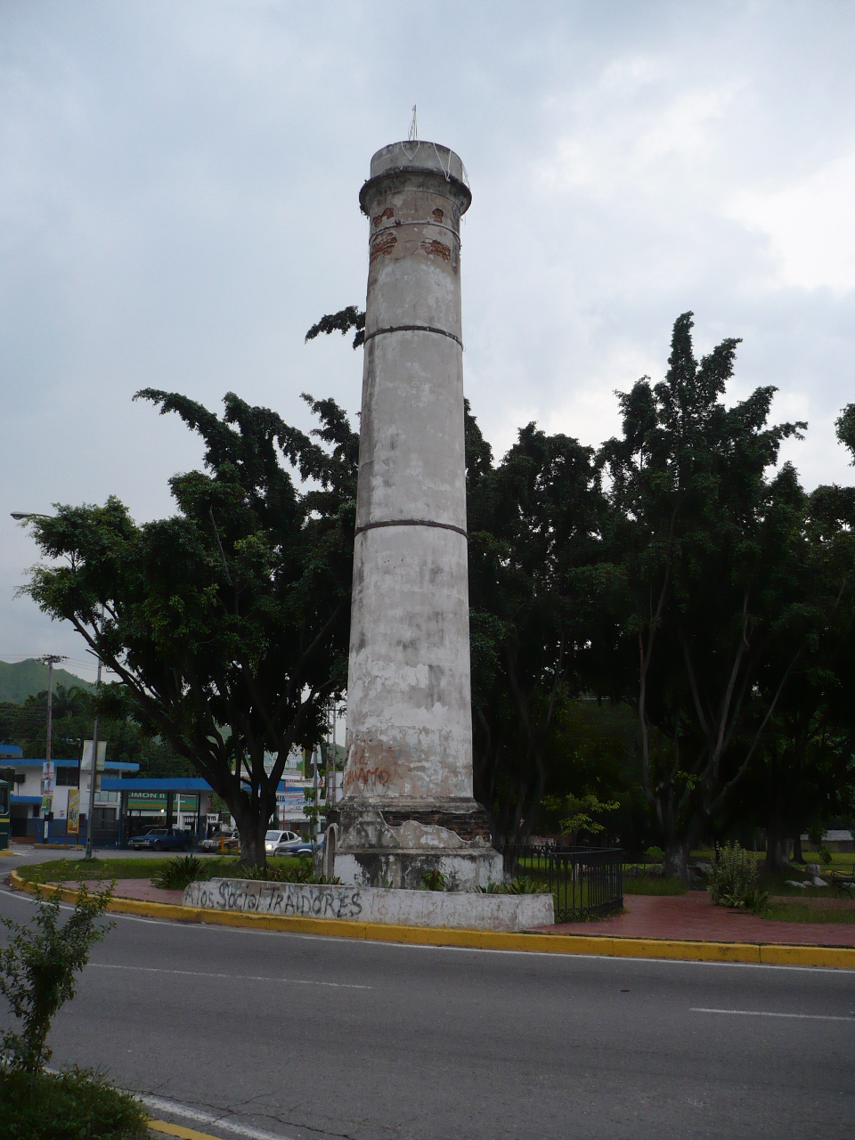 Torreón de El Limón (Venezuela), chimenea de antiguo trapiche, el cual se conserva a la entrada de El Limón como monumento de la historia agricola de la zona.